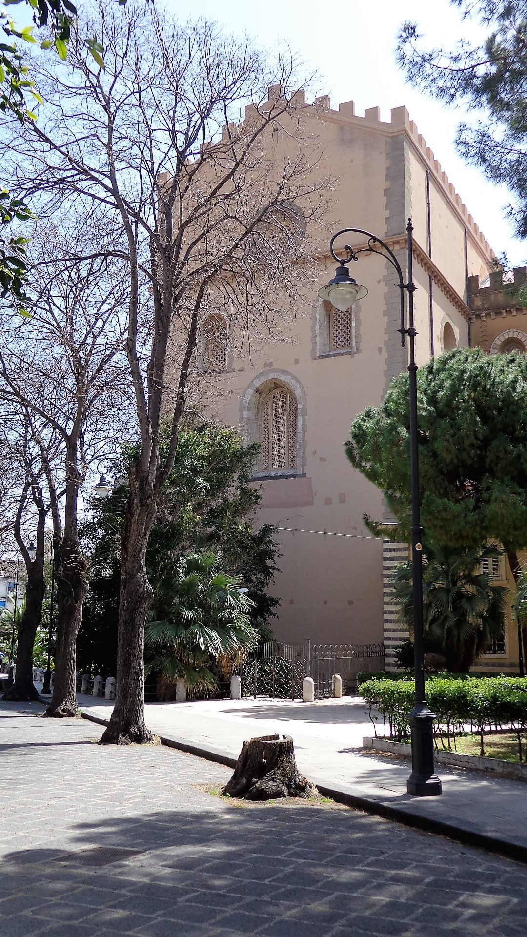 Il transetto vista da Piazza Immacolata di Marmo